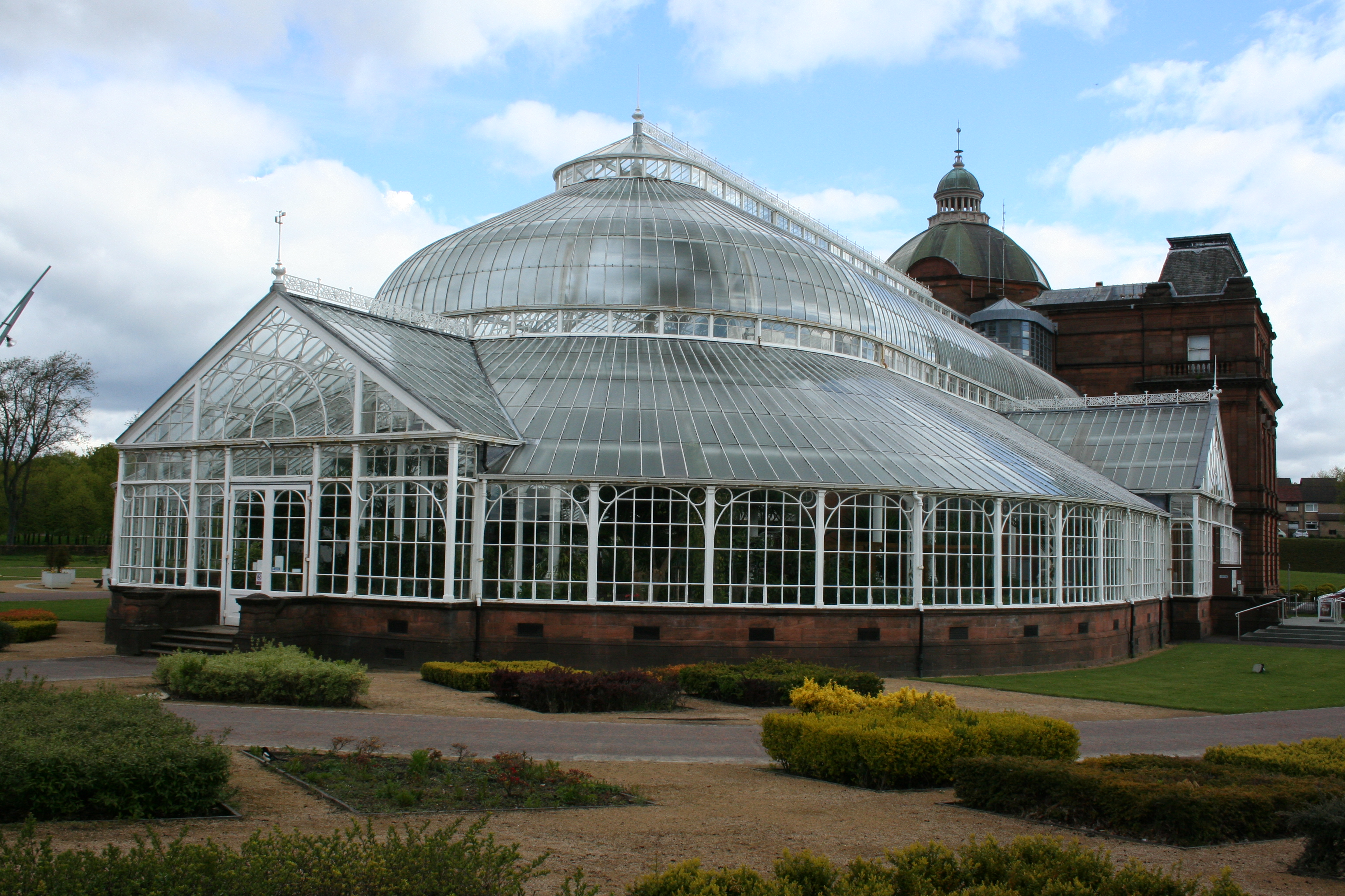 Glasgow People's Palace Museum im People's Palace & Winter Garden (1a Glasgow Green, Mehr Informationen).